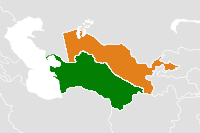 Узбекистан и Туркмения политической карте